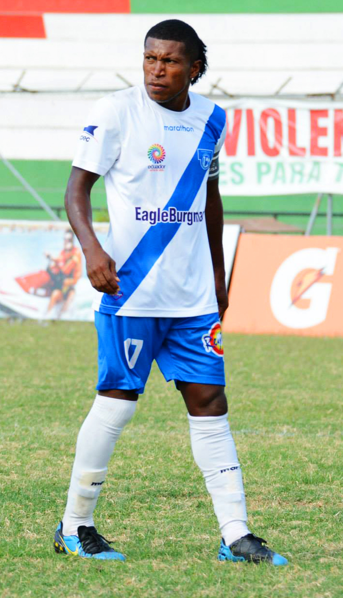 Enrique Gamez jugando para Esmeraldas Petrolero en el 2014